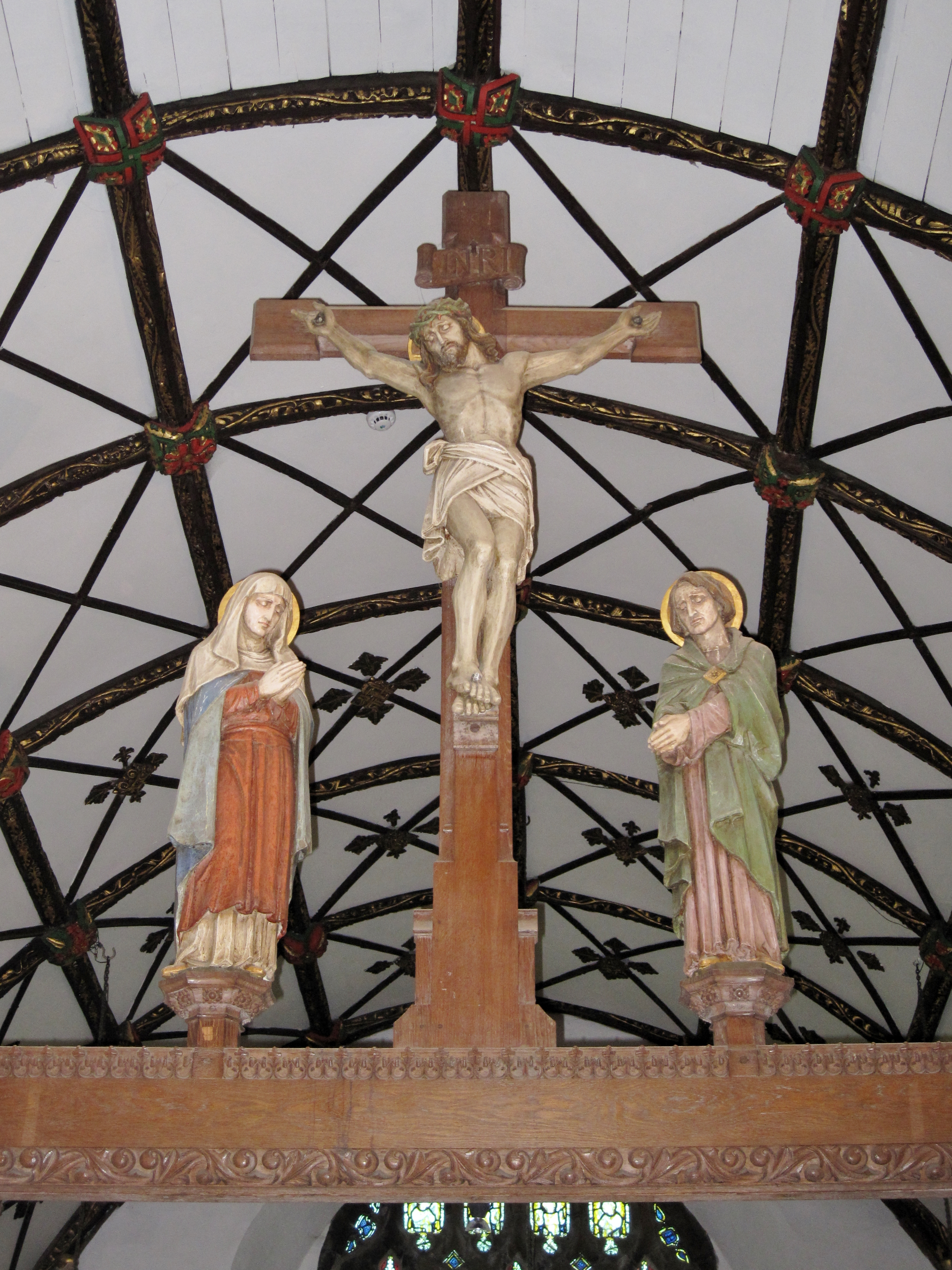 Innenraum der Gemeindekirche von St. Ives, Cornwall, England